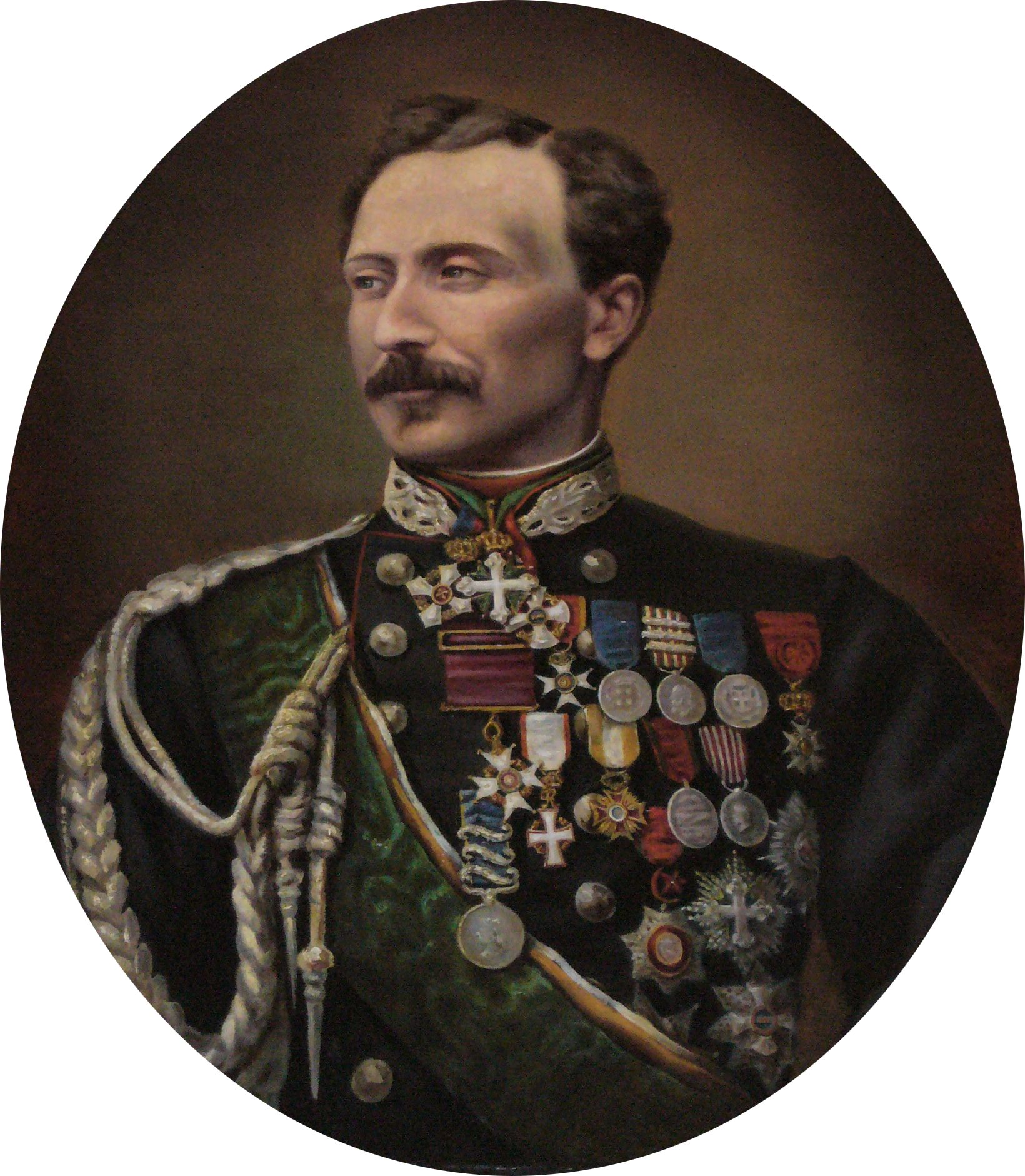 Italian general Giuseppe Govone (1825-1872)